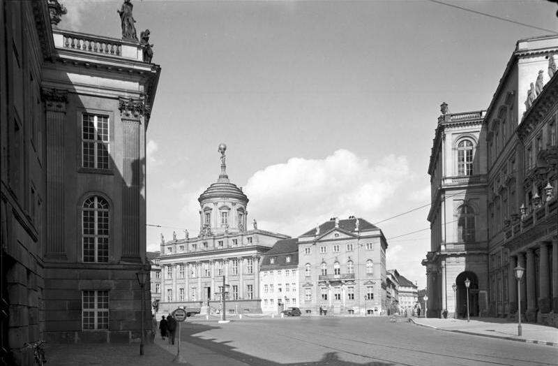 Potsdam.- Alter Markt